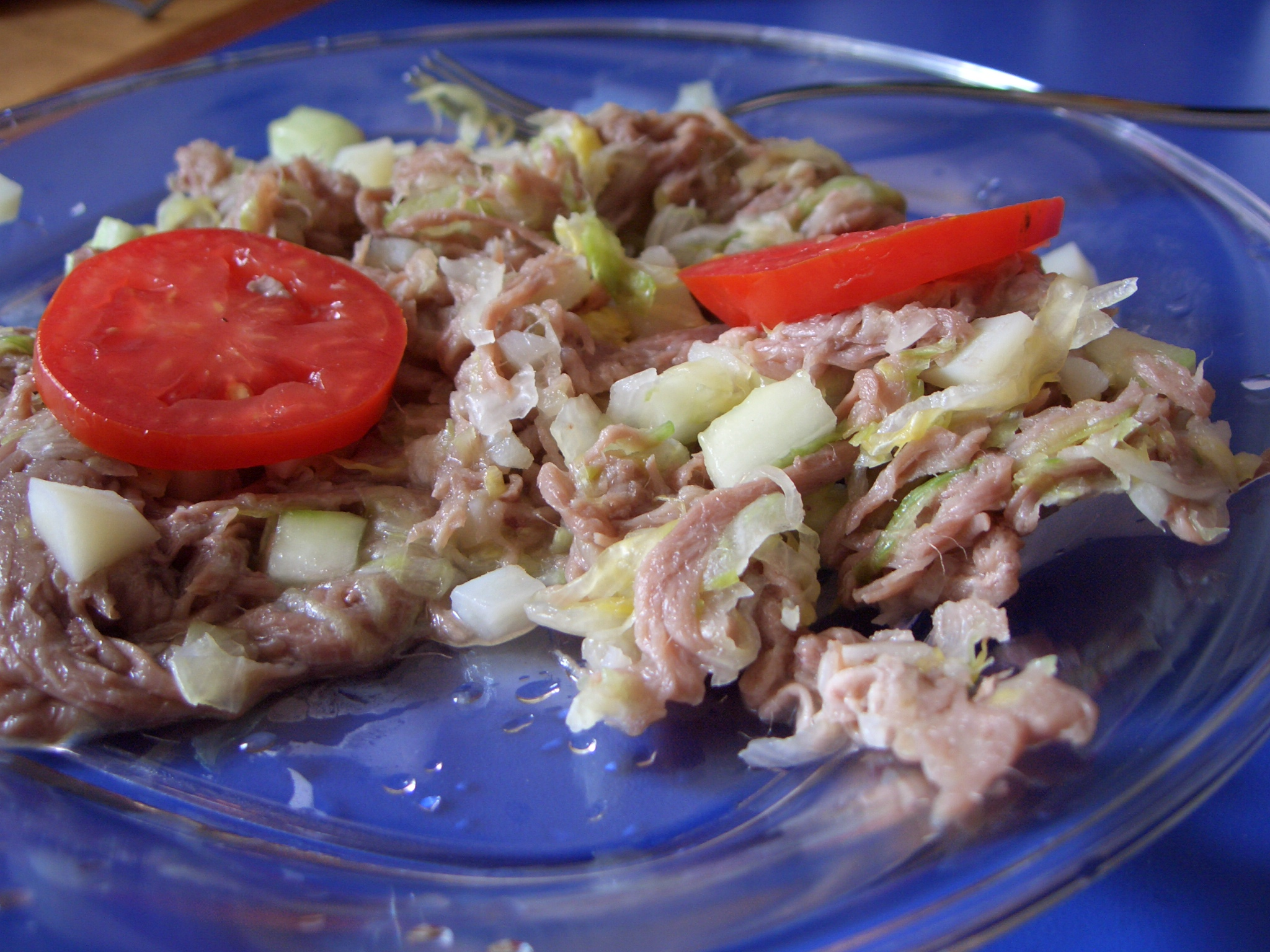 Salpicón de res